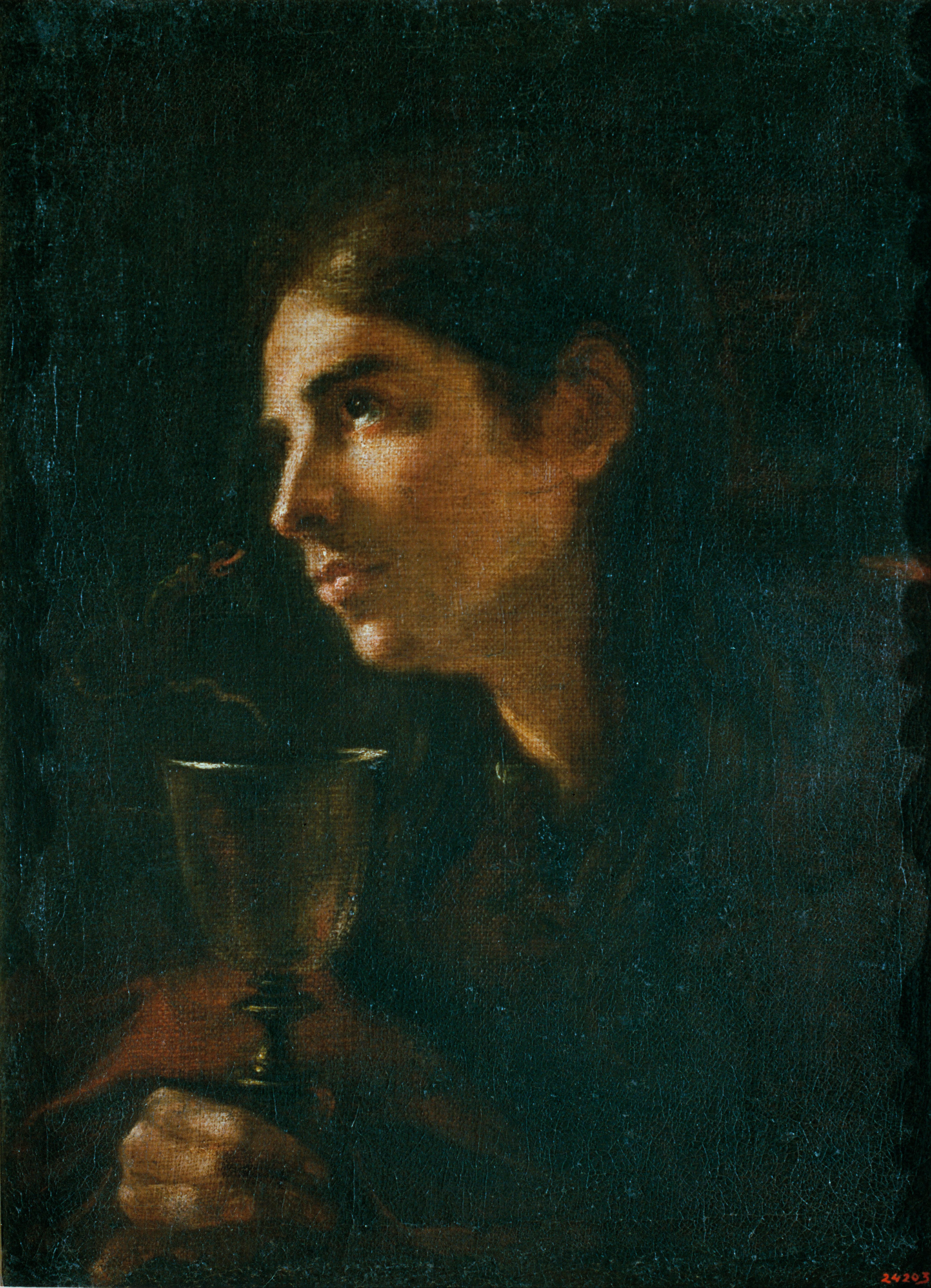 La obra representa a San Juan Evangelista.